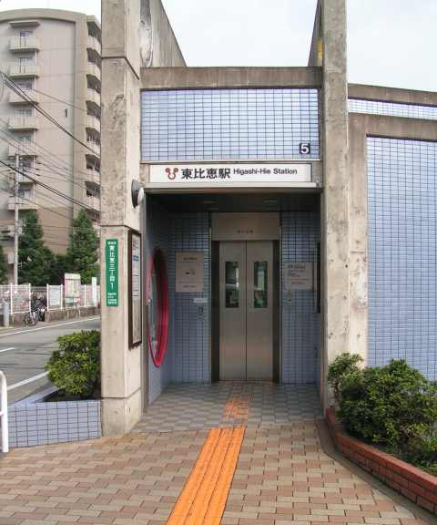 東比恵駅